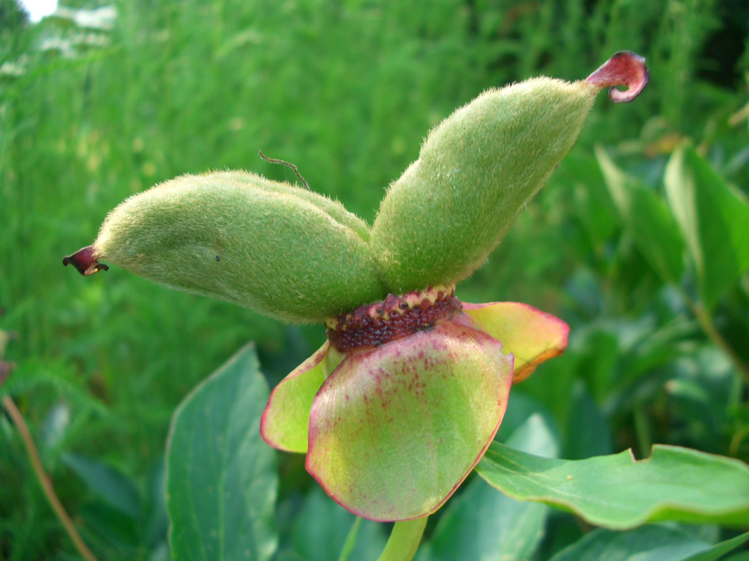 Knospe der Fremdartigen Pfingstrose (Paeonia peregrina) im Botanischen Garten zu Berlin